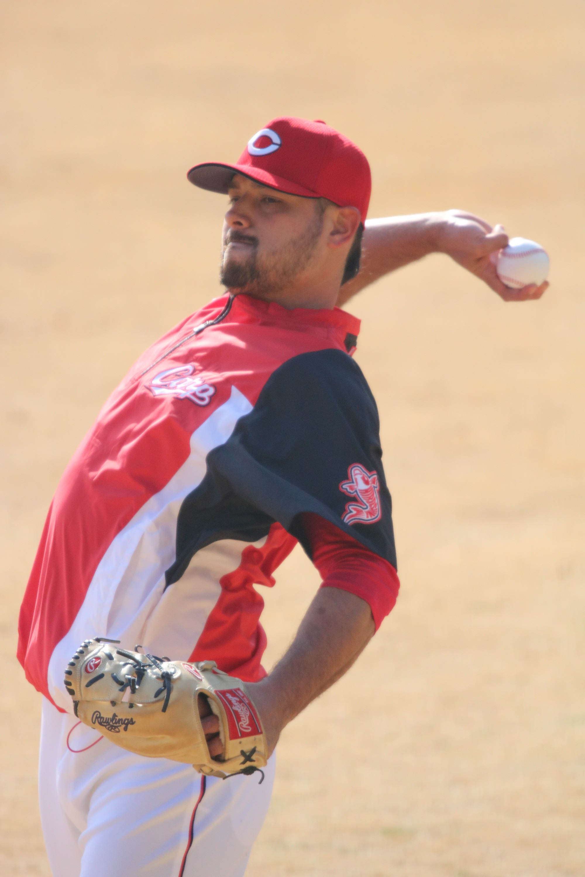 2018/2/11 天福球場にて